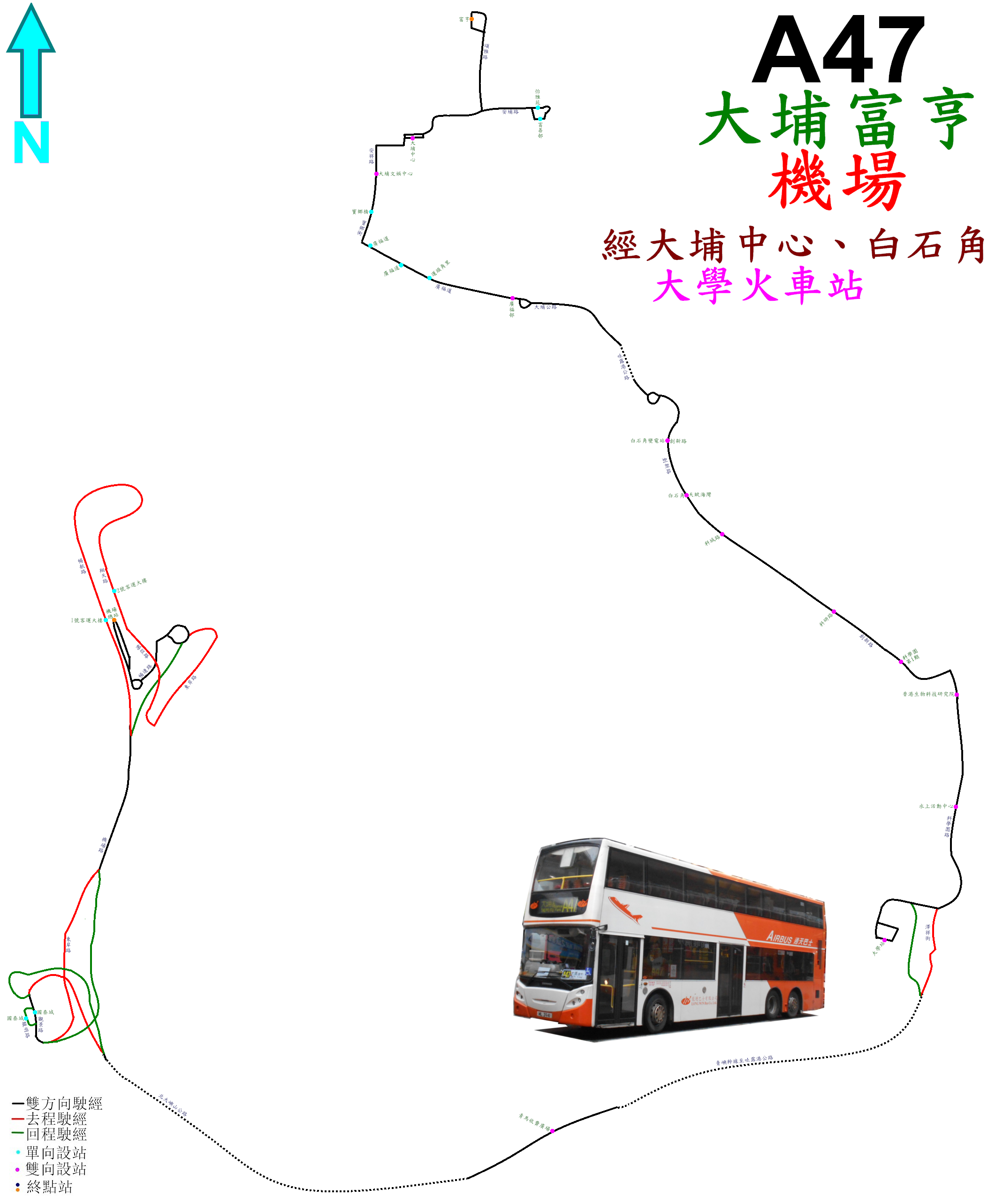 中文（香港）: 龍運巴士A47線的走線圖